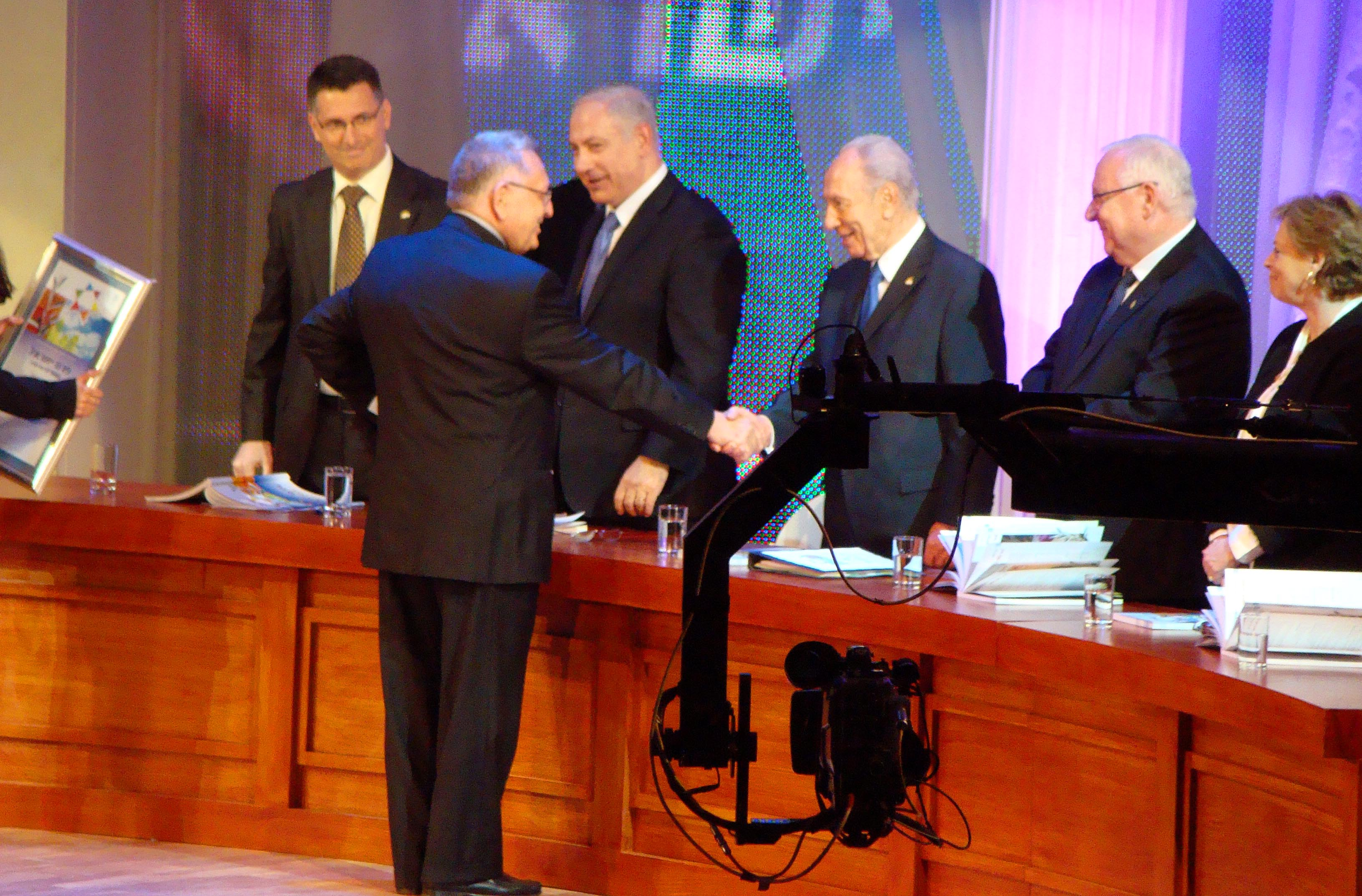 יאיר אהרני בעת קבלת פרס ישראל, אפריל 2010